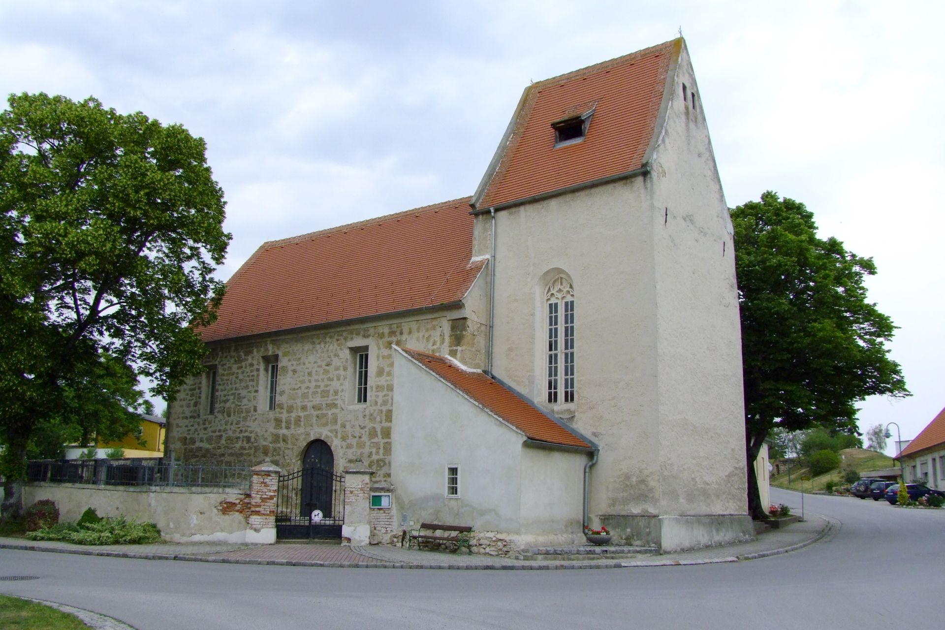 Kath. Filialkirche hl. Geist